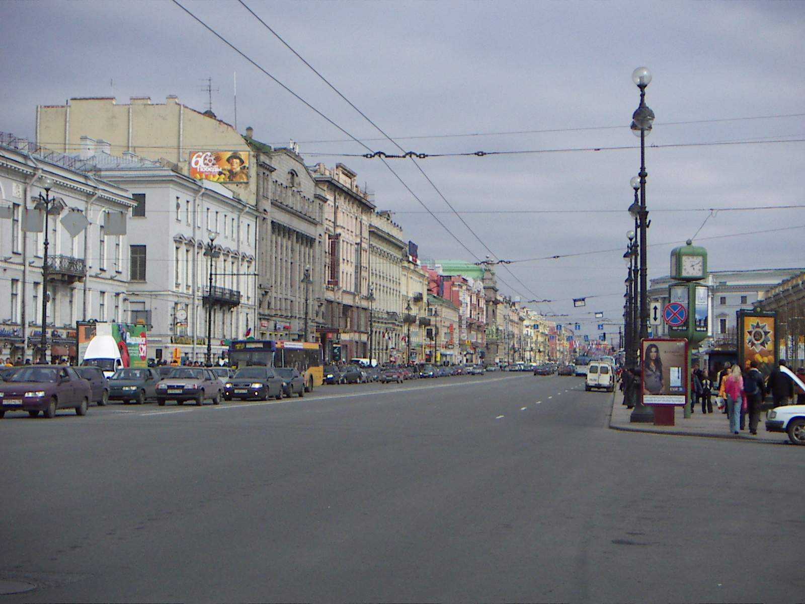 Newski-Prospekt, Sankt Petersburg, Russland